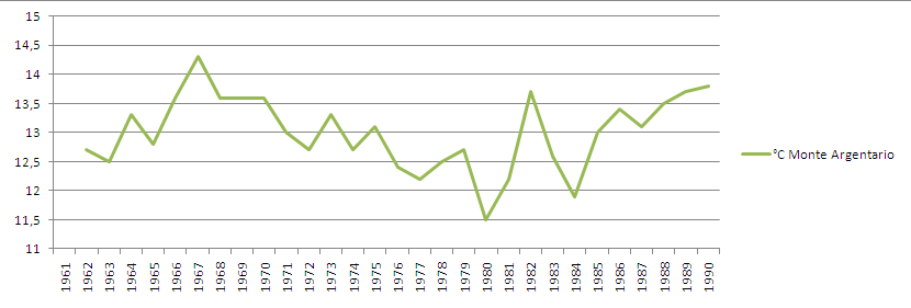 Stazione meteorologica di Monte Argentario: andamento della temperatura media annua dal 1961 al 1990.